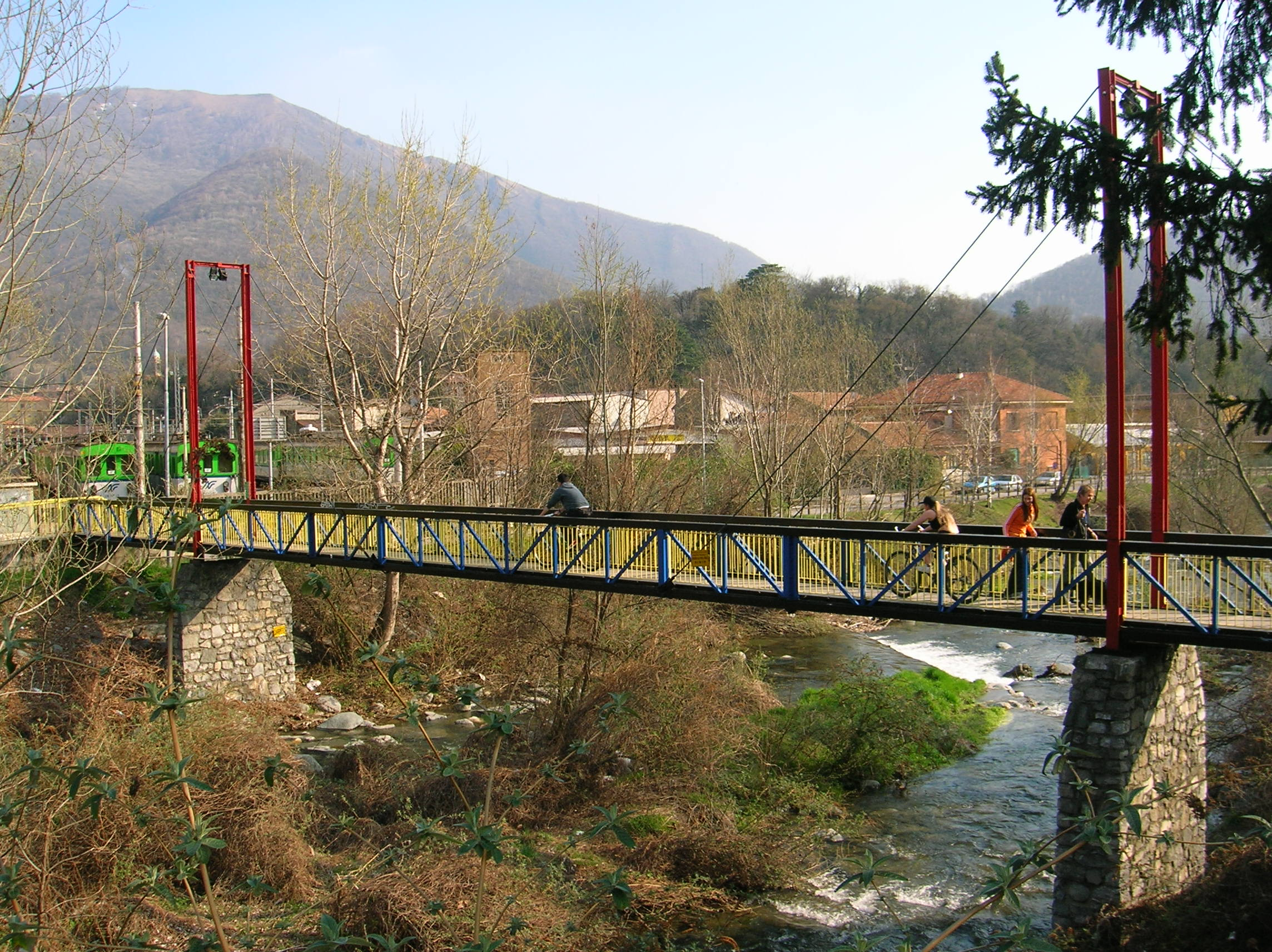 ponte pedonale e ciclabile recentemente ridipinti di colori sgargianti (rosso, giallo, blu, nero) battezzato affettuosamente dagli assesi "ponte di Brooklyn"; unisce Scarenna, frazione di Asso, alla stazione delle Ferrovie Nord Milano Esercizio di Asso-Canzo. Vista globale